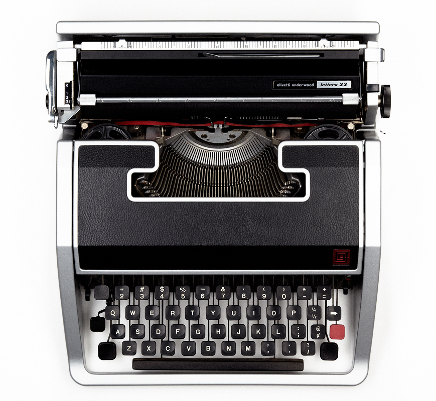 Olivetti Lettera 33 Typewriter Ettorre Sottsass